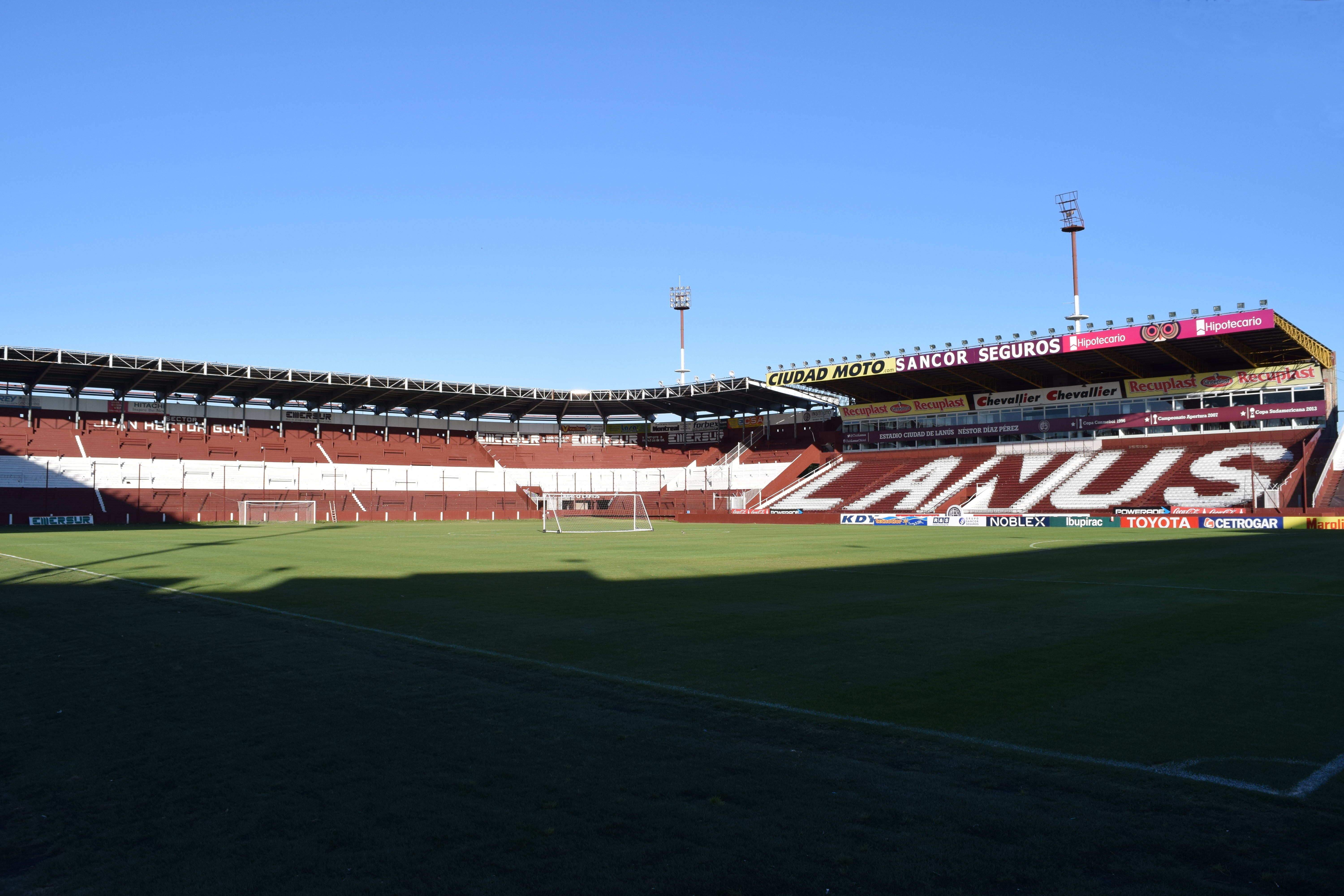 Vista de la tribuna norte (sobre la calle General Arias) y de la platea de socios (sobre la calle Fray Esquiú) del Estadio Ciudad de Lanús - Néstor Díaz Pérez.